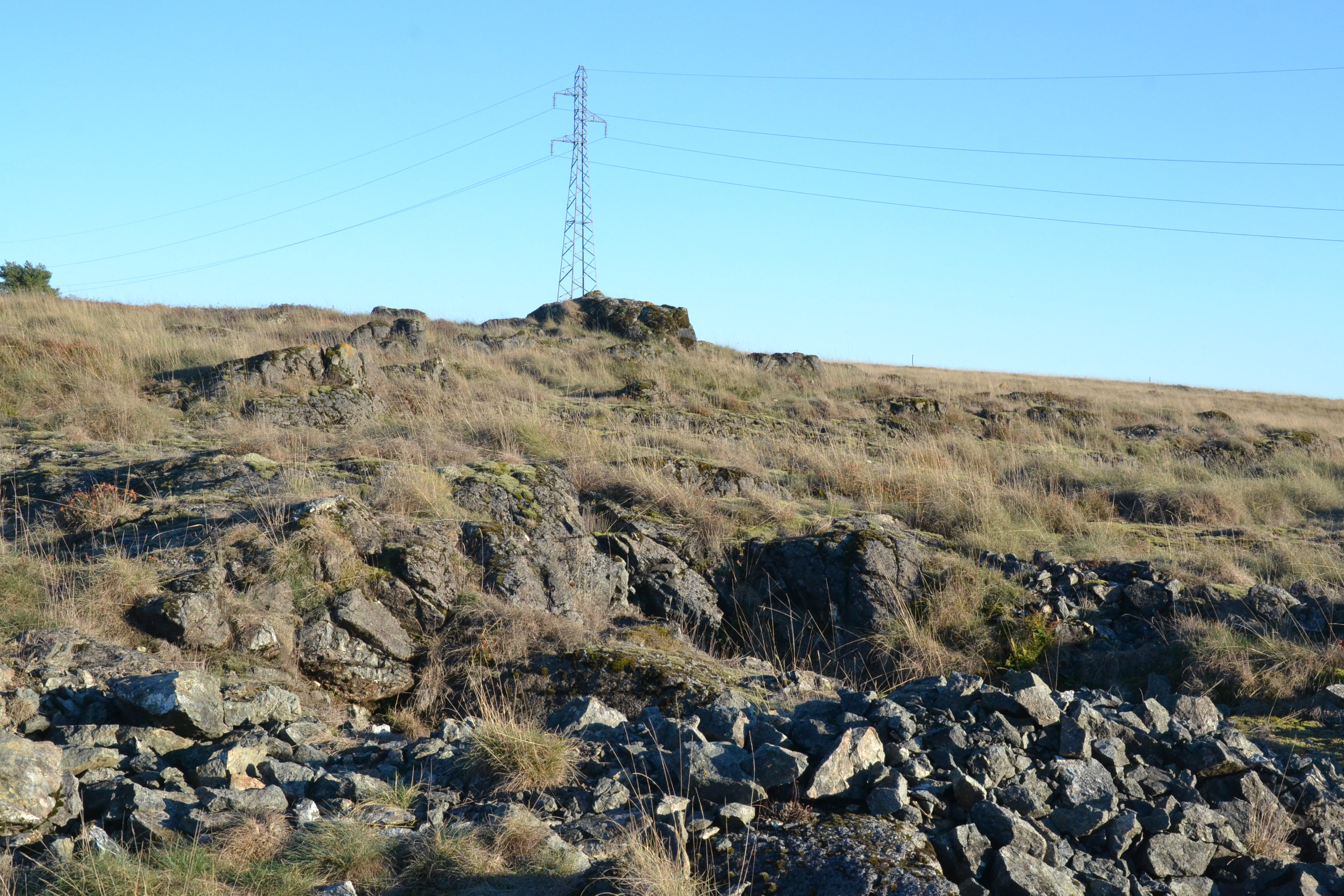 Paysage de la lande de Saint-Laurent (La Roche-l'Abeille, Haute-Vienne, France)